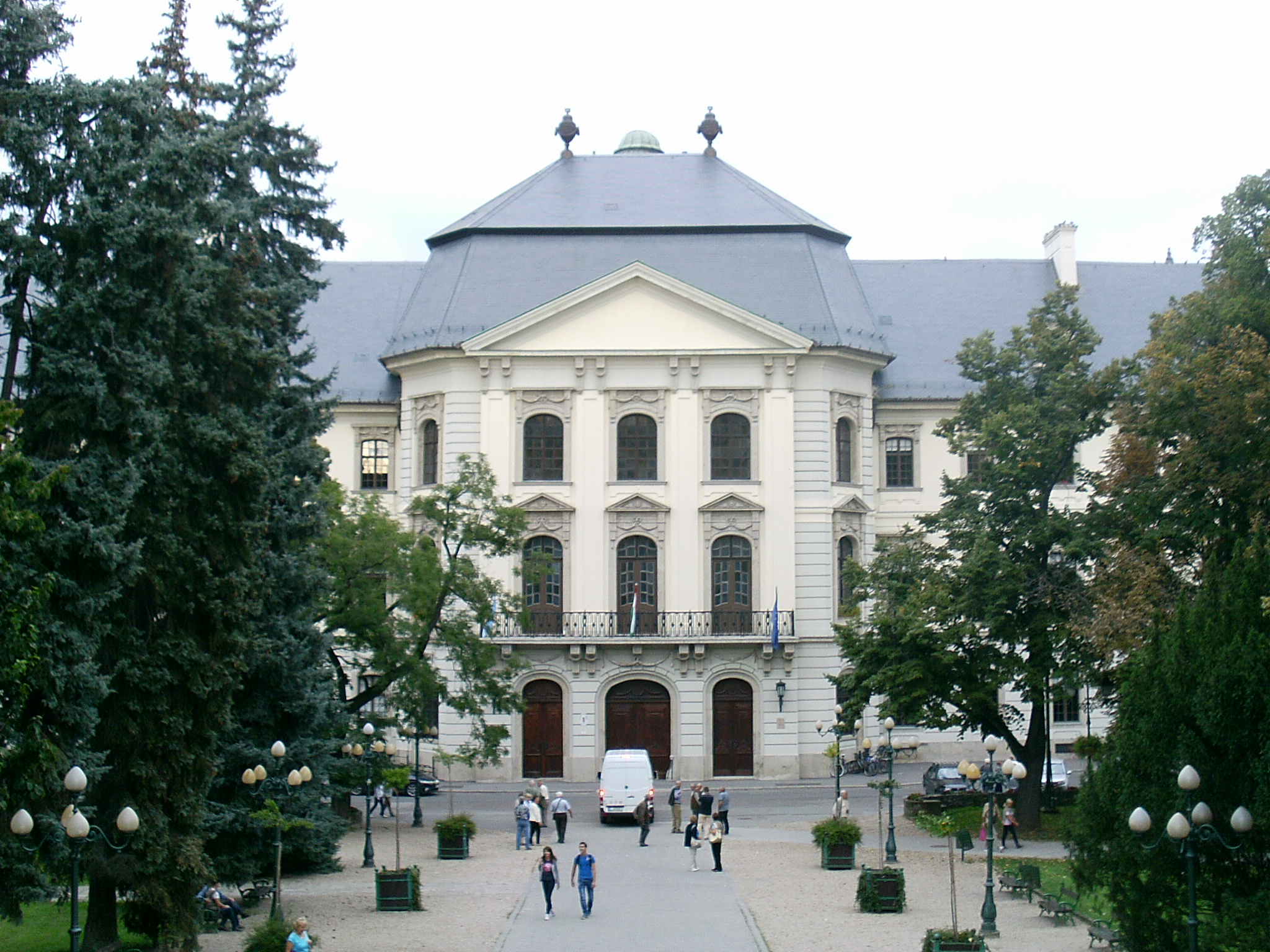 Líceum, Eger, 2014.